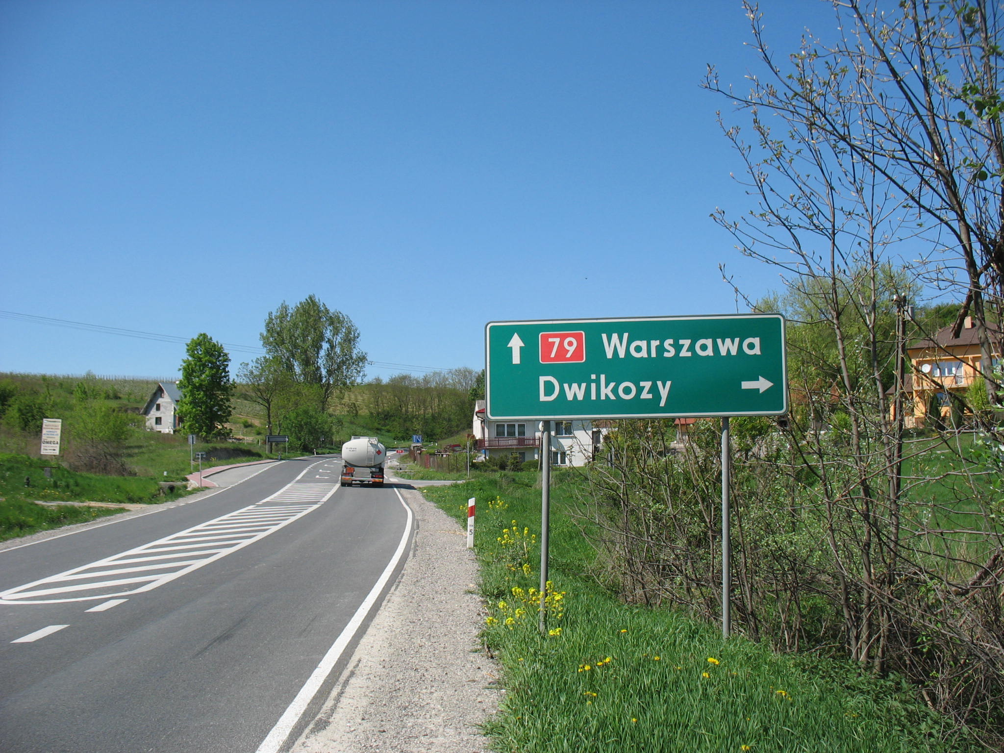 DK79 w Wysiadłowie, pow. Sandomierski